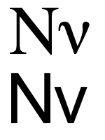 greek letter nu